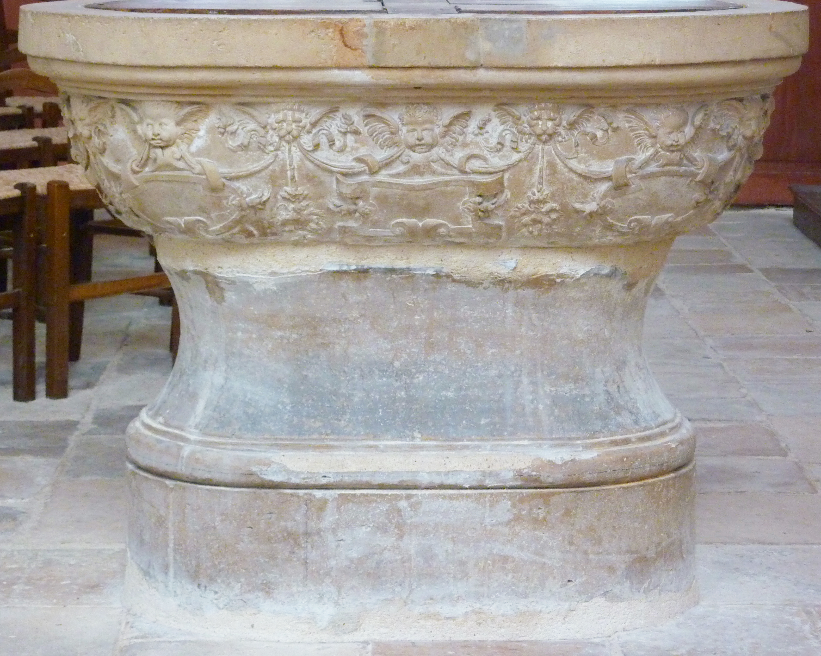 Taufbecken in der katholischen Pfarrkirche Saint-Acceul in Écouen